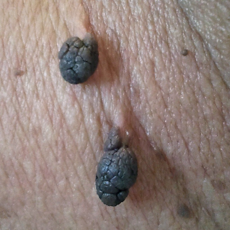 Molluscum pendulum (acrochordon)